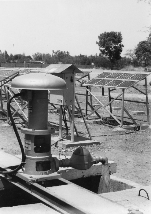 Het zonnepanelen bestaan uit siliciumcellen en leveren gelijkstroom. De volledige naam van de school is: école inter-états d'ingénieurs de l'Equipment Rural (informatie fotograaf).